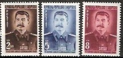 Сталин Албания